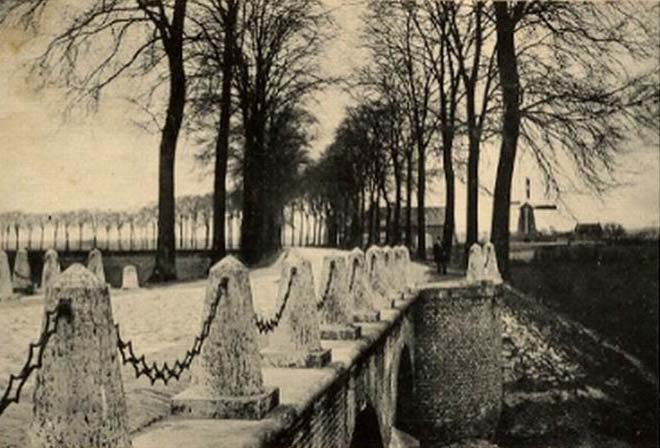 Niersbrug bij Gennep, circa 1900